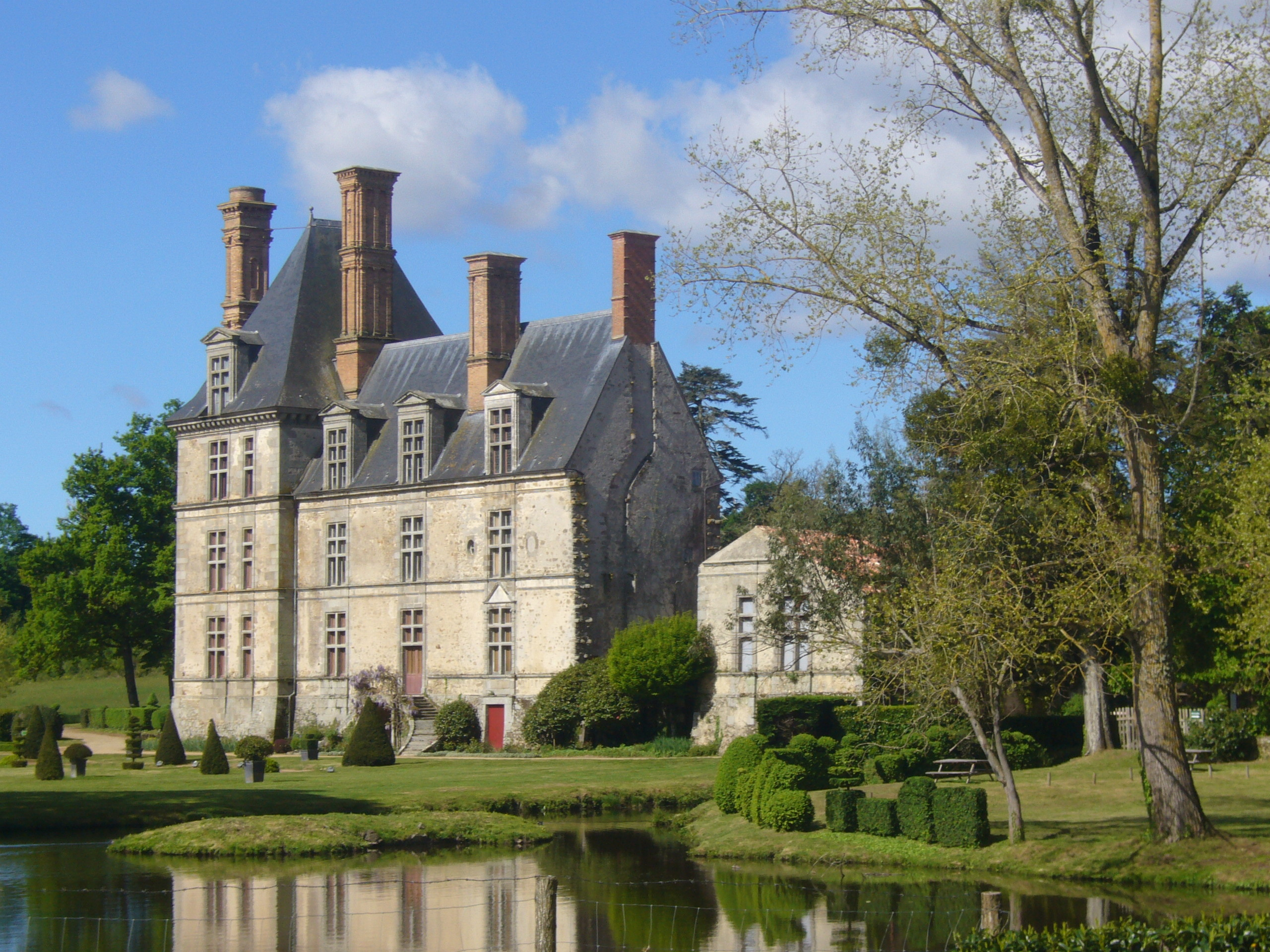 Photos du Château de la Guignardière